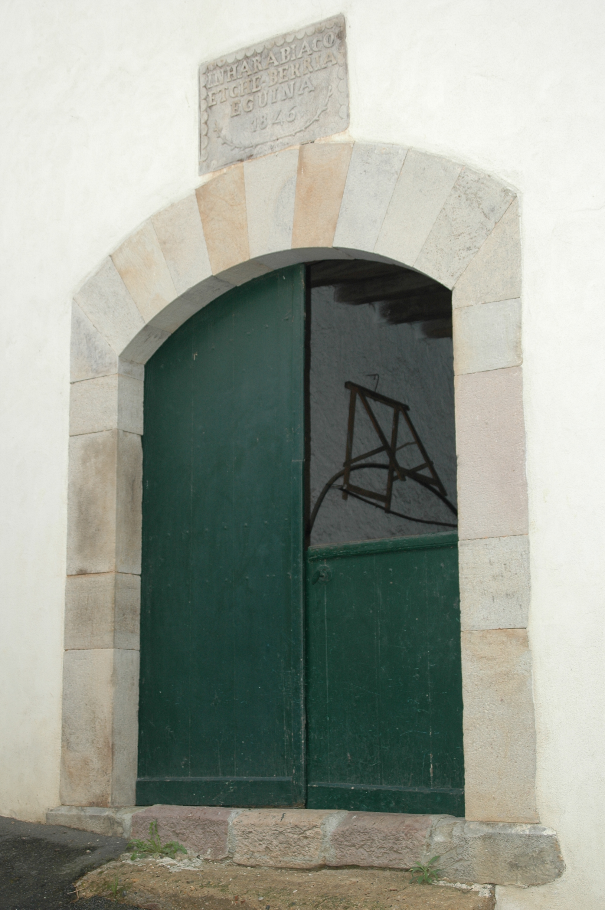 Urepel, linteau sculpté